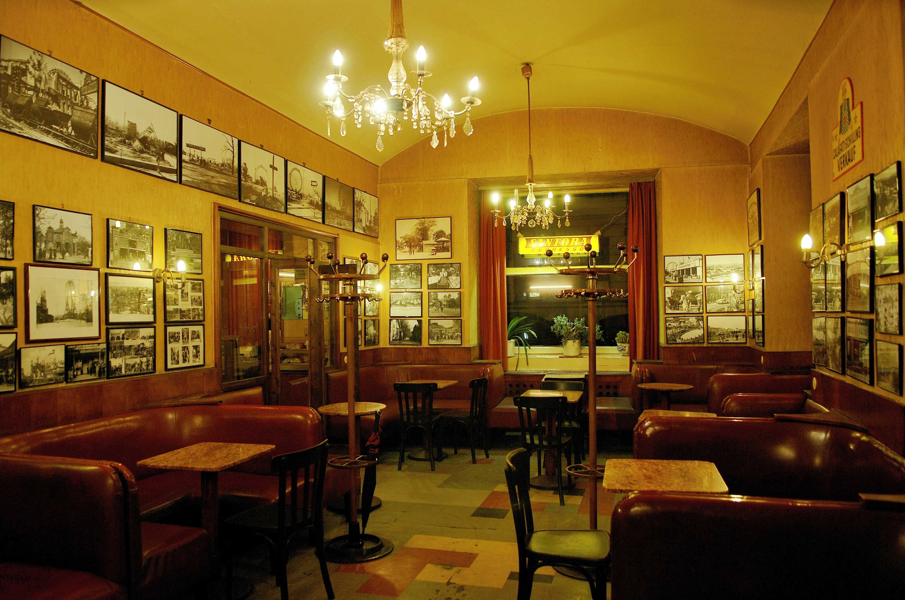 Kaffee Urania, 1030 Wien, Radetzkystraße 24